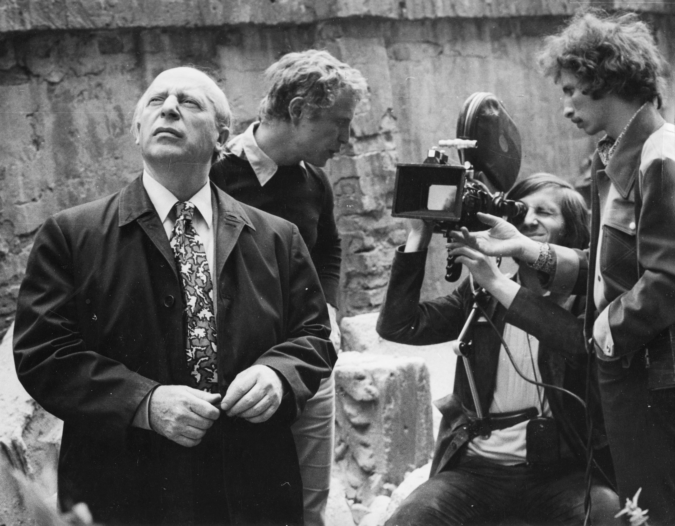 Óbudán forgat portréfilmet Nemes Endre Svédországban élő festőművészről az MTV Képzőművészeti Osztálya. A művész mögött a rendező, Jeles András, az operatőr Gulyás János.